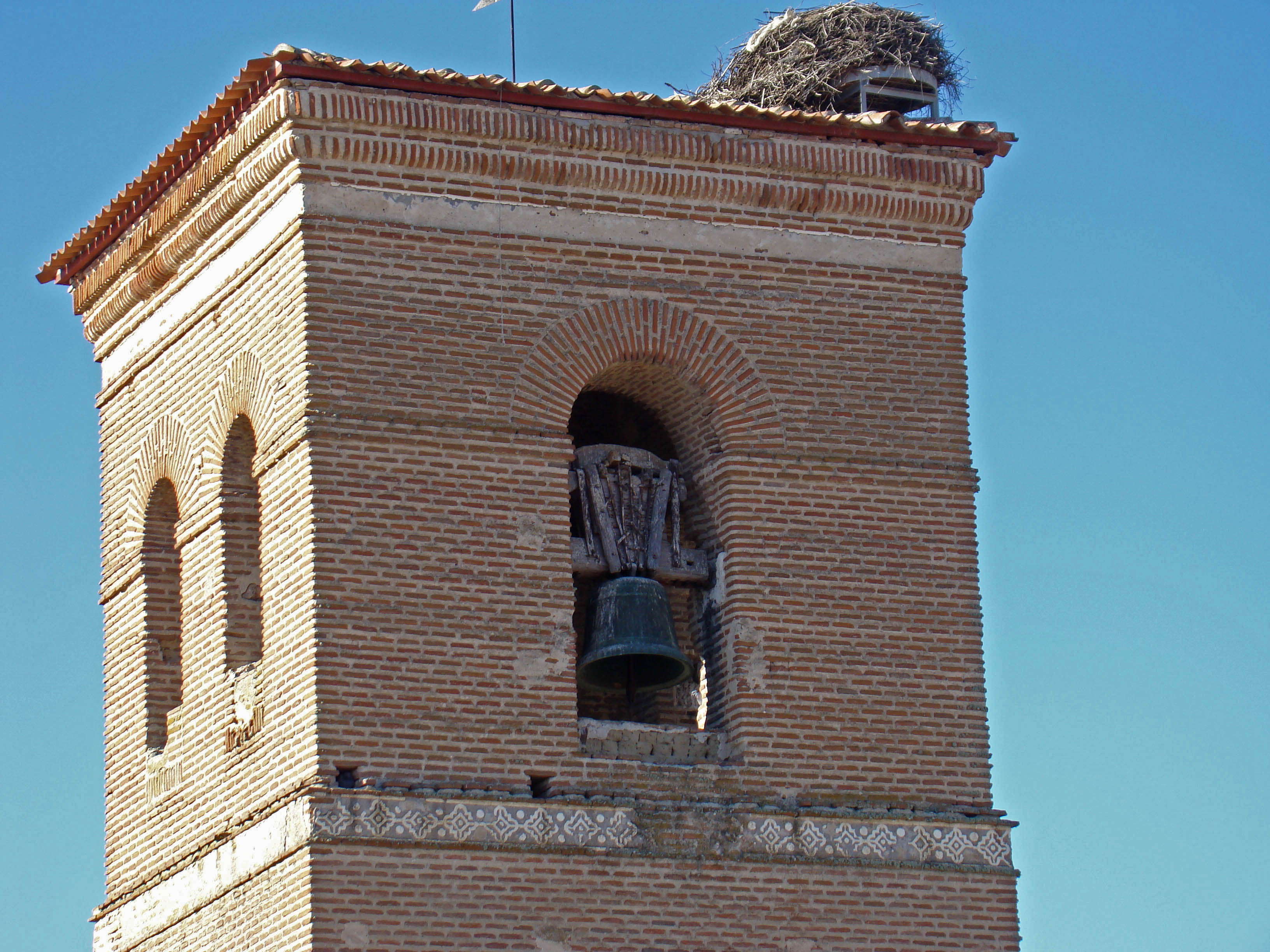 Moraleja de las Panaderas en la provincia de Valladolid, España. Campanario de la torre de la iglesia de San Boal.